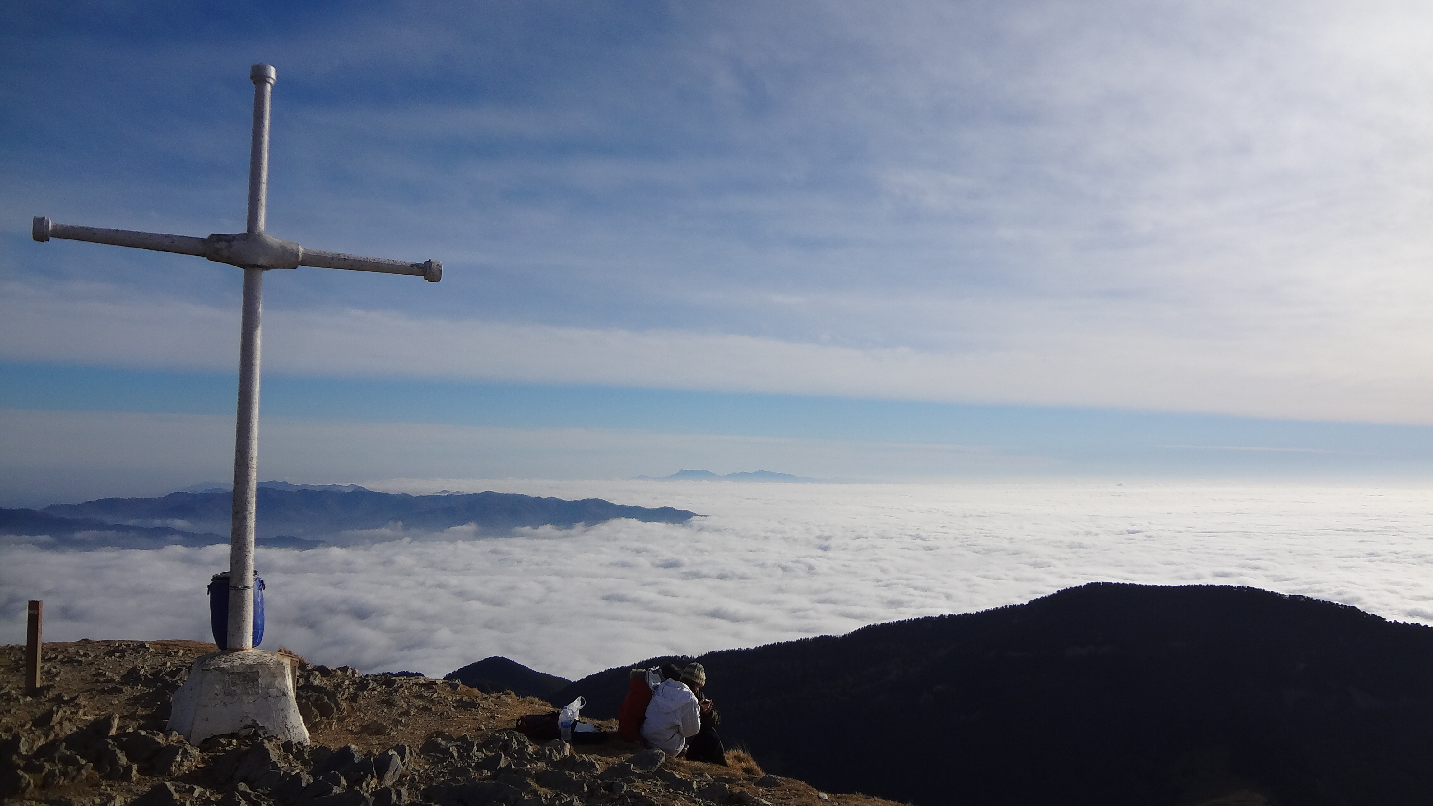 Serra Cavallera (Ripollès) This is a a photo of a natural area in Catalonia, Spain, with id: ES510174